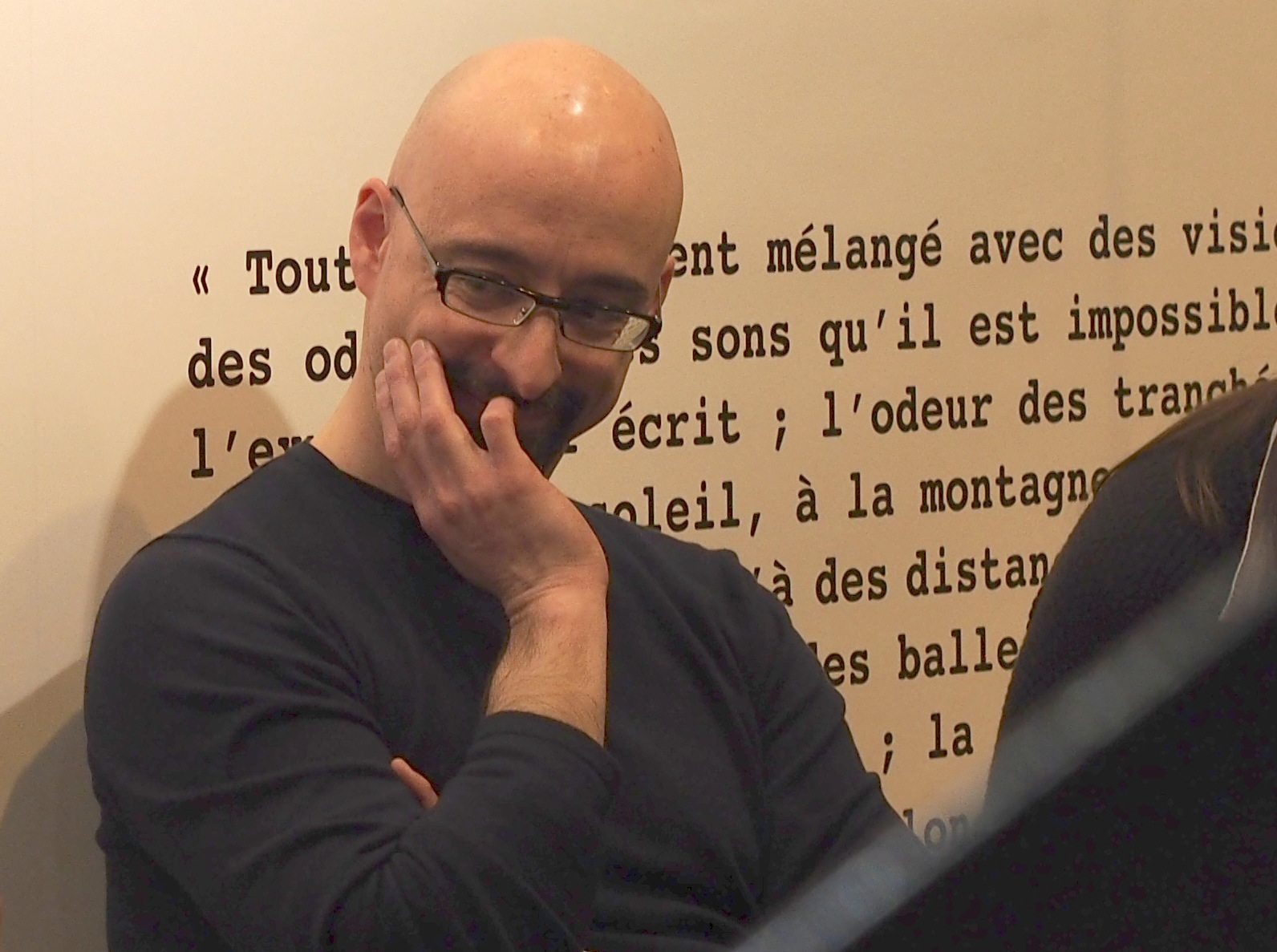 L'écrivain catalan Salvador Macip au Salon du livre de Paris le 24 mars 2013.